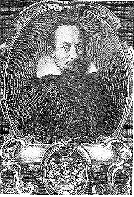 Lamoral von Taxis, Kupferstich, 1619